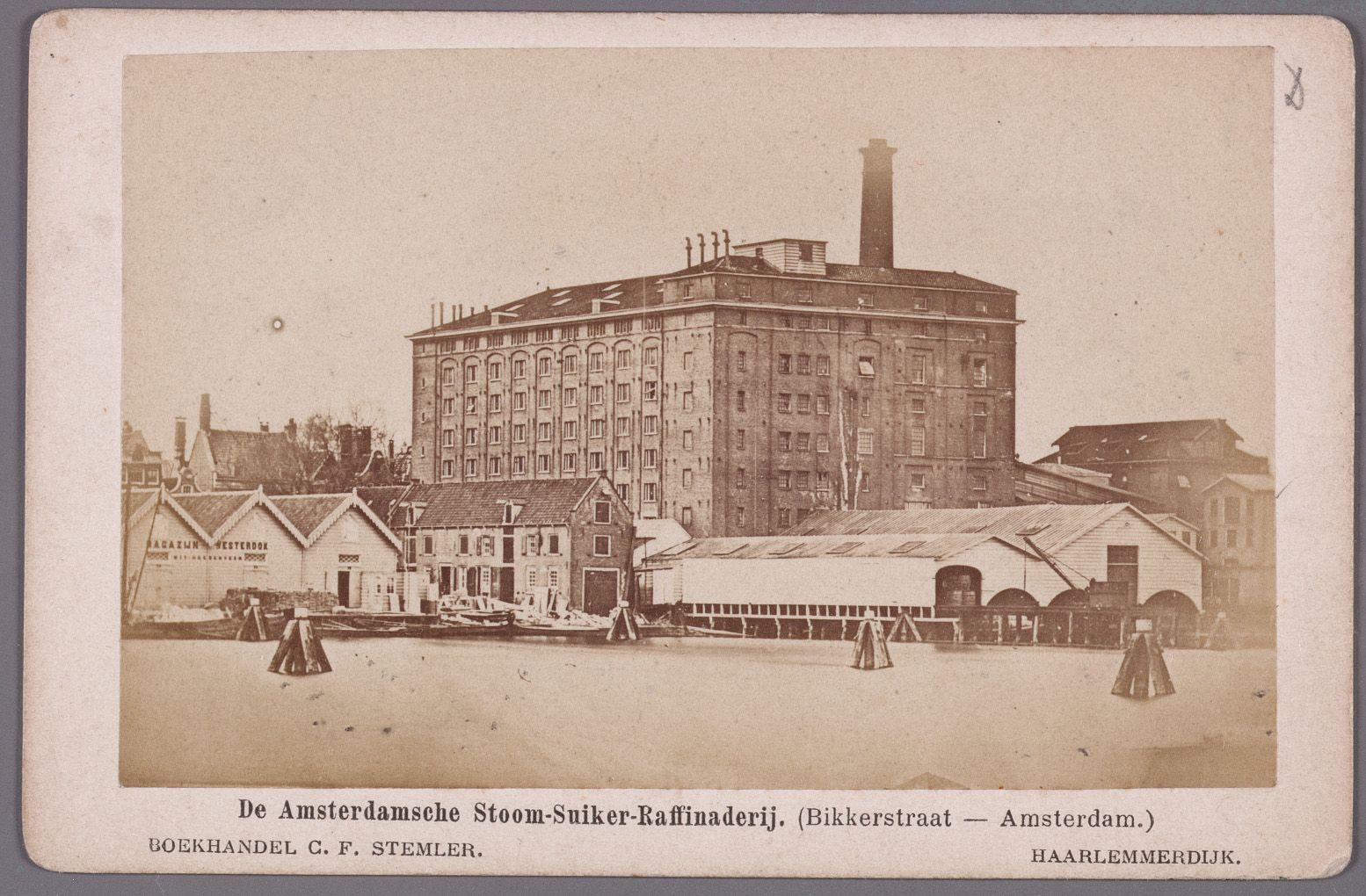 Beschrijving Westerdok gezien naar de Amsterdamse Stoom-Suiker-Raffinaderij in de Grote Bickersstraat, afgebrand in september 1874 Documenttype foto Vervaardiger Stemler, C.F. Collectie Collectie Stadsarchief Amsterdam: kabinetfoto's Datering 1870 ca. Geografische naam Grote Bickersstraat Westerdok Inventarissen Afbeeldingsbestand 010005001049